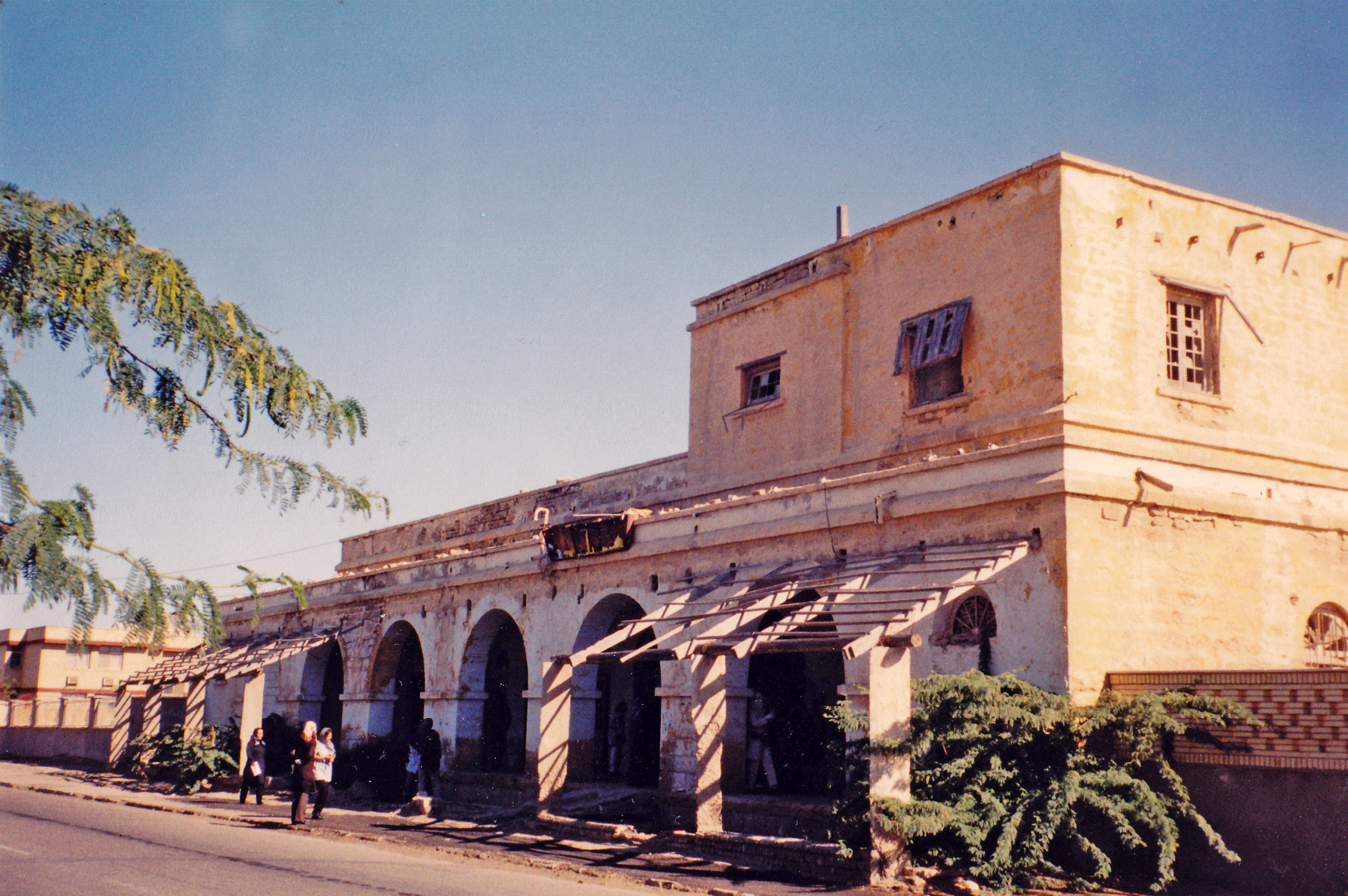 ساختمان قدیمی پست